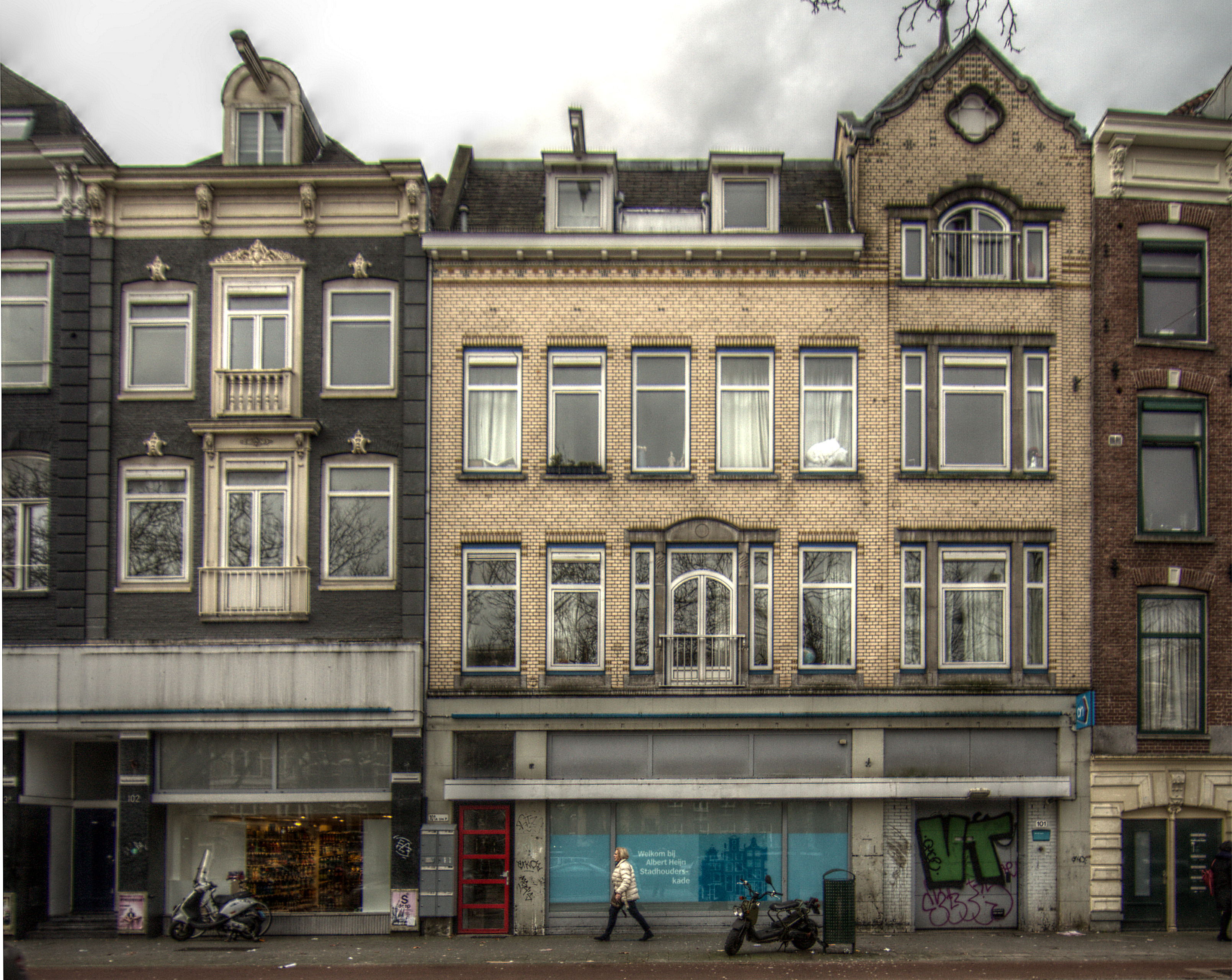 Het pand aan de Stadhouderskade 101, december 2015, architect is Alphonsus Maria Leonardus Aloysius Jacot